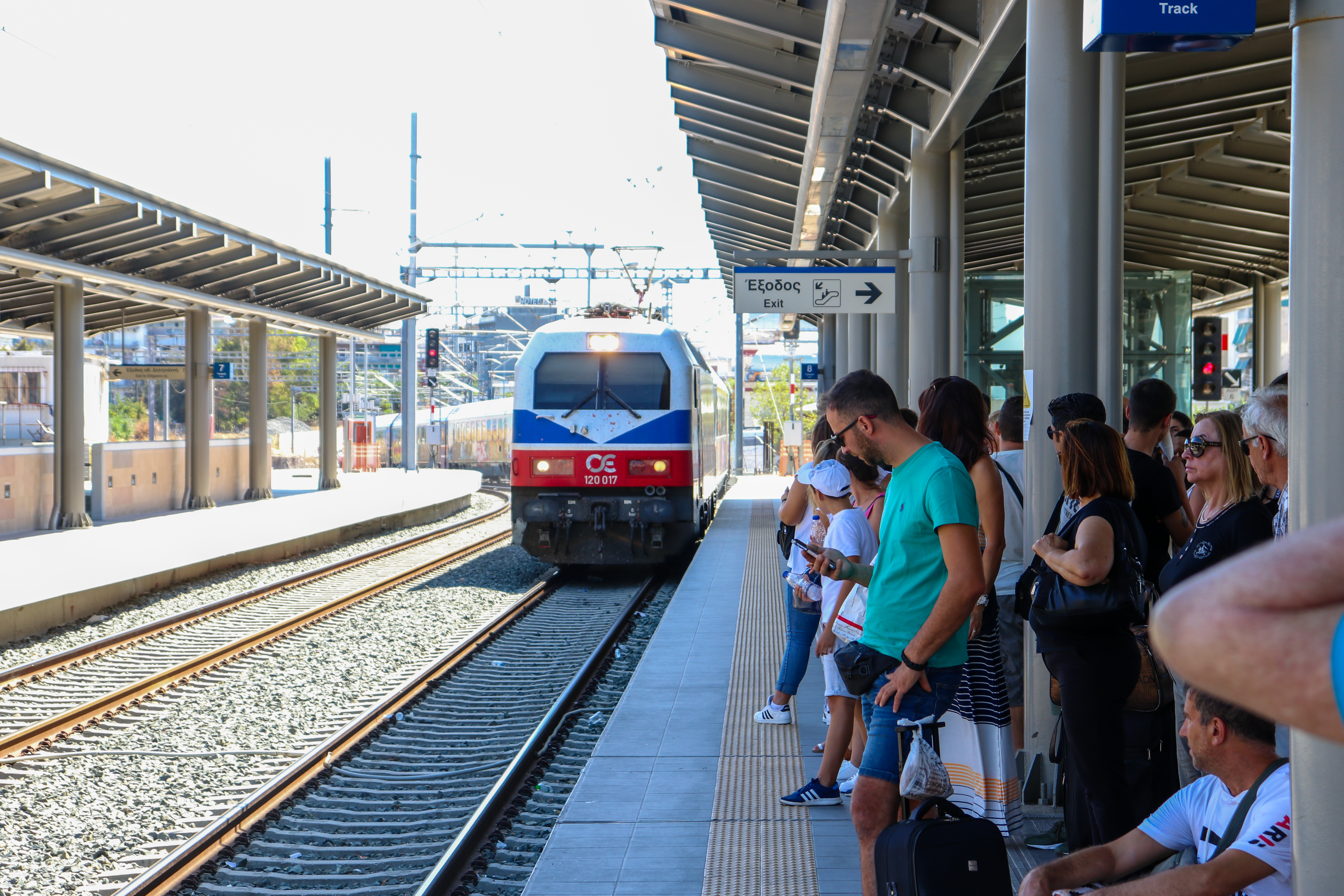 Железнодорожный Вокзал «Ларисса». Прибывает поезд OSE 120 017 Афины-Салоники